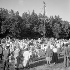 Midsommar på Solviksängen, Smedslätten, Bromma, 1945-1955.